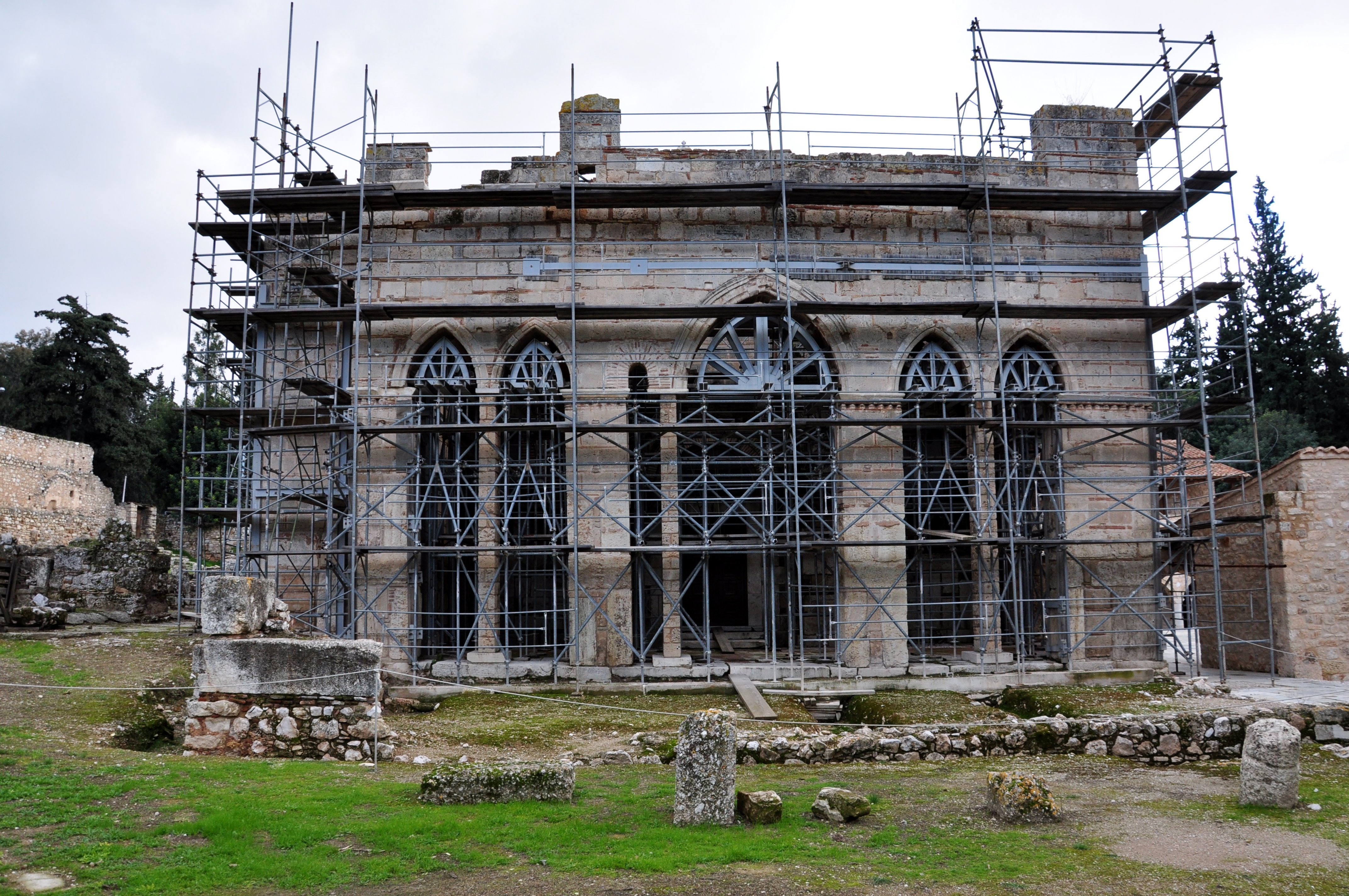 Dafni, obrzeża Aten, przedsionek świątyni. Narzuca się uwaga, że obok centralnego łuku także stała niegdyś antyczna kolumna, jeszcze ze świątyni dafnijskiego Apollona. Ale zrabowano. Choć formalnie za zgodą władz, okupacyjnych oczywiście, tureckich.